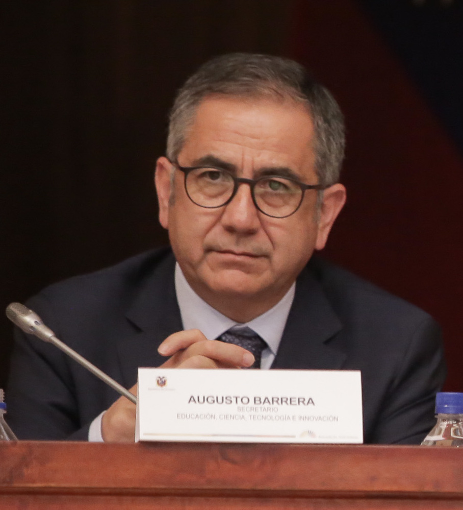 Comisión de Educación recibe a Augusto Barrera Guarderas, secretario de Educación Superior, Ciencia, Tecnología e Innovación -SENESCYT- y demás autoridades de los organismos públicos del Sistema y las Instituciones de Educación Superior. Fotografía por: Alexander Moya / Asamblea Nacional 22 de marzo de 2018 - Comisión de Educación Comisión de Educación recibe a Augusto Barrera Guarderas, secretario de Educación Superior, Ciencia, Tecnología e Innovación -SENESCYT- y demás autoridades de los organismos públicos del Sistema y las Instituciones de Educación Superior. Fotografía por: Alexander Moya / Asamblea Nacional